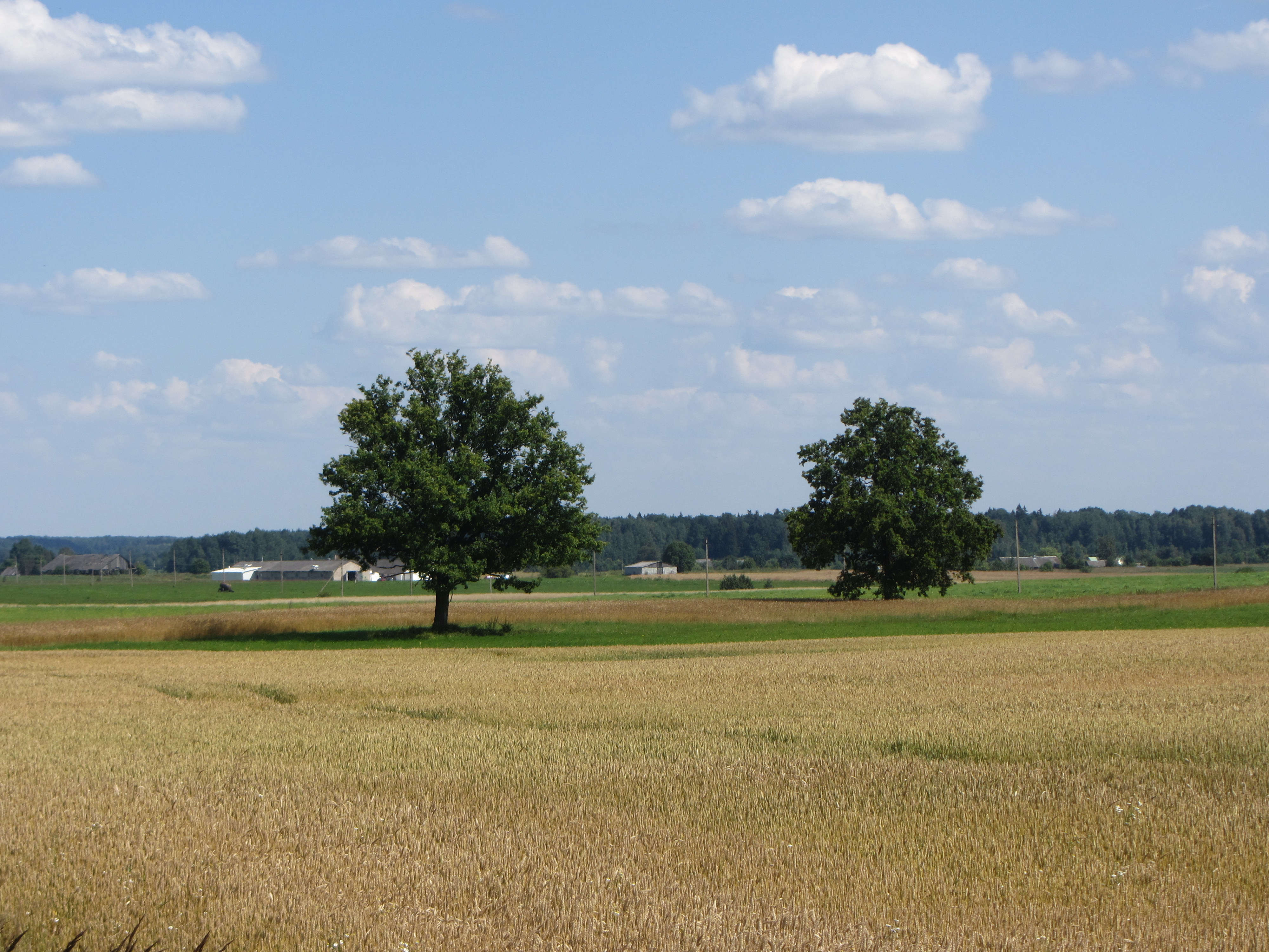 Gelvonų sen., Lithuania